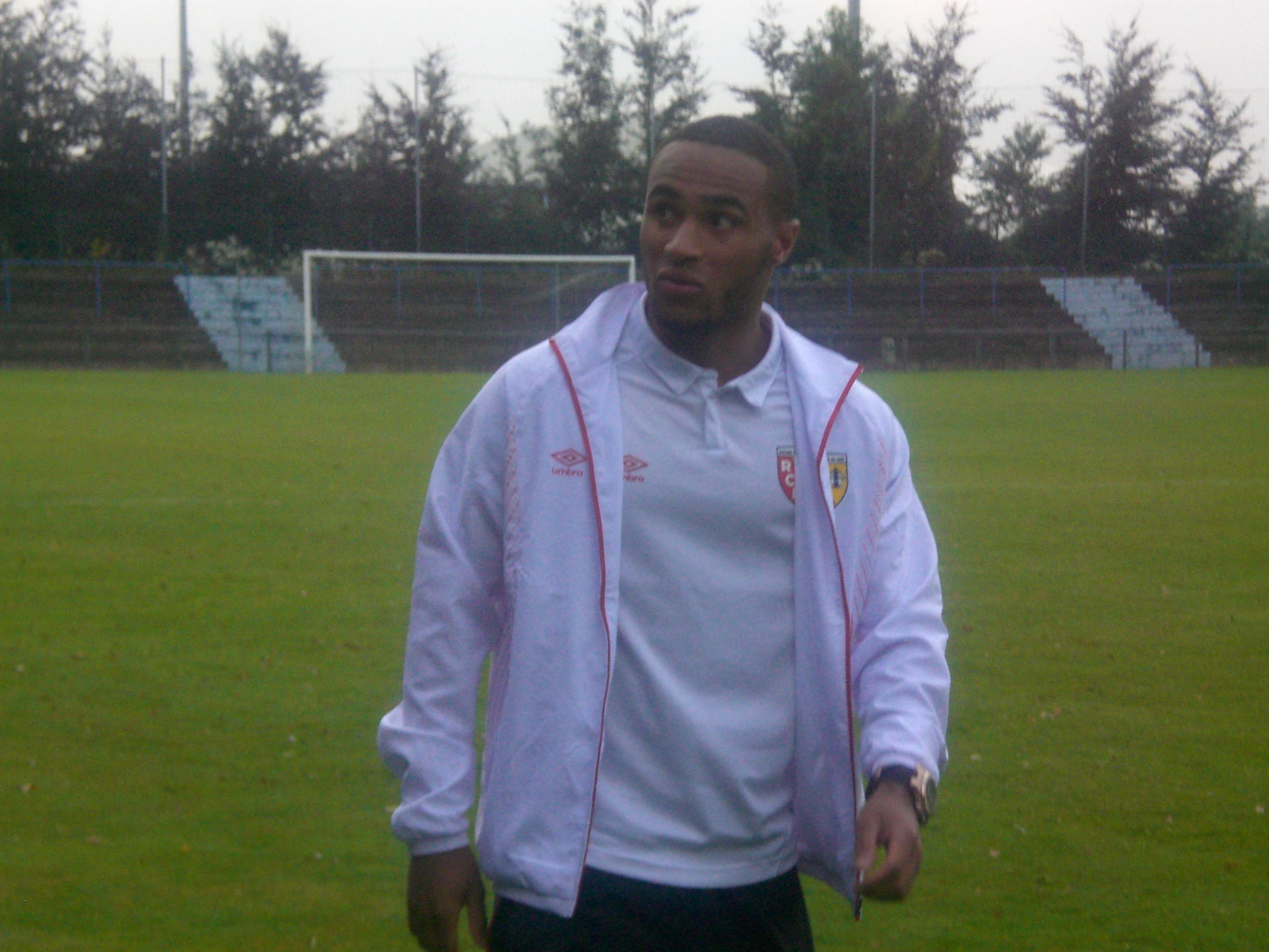 Nadjib Baouia après la rencontre RC Lens B / FC Dieppe, comptant pour la 1ère journée du Championnat de France Amateur de football (CFA), le 15 août 2015, au Stade François-Blin d'Avion